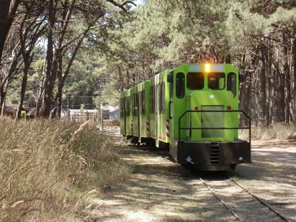 Formacion del Tren ingresando al interior del Parque Miguel Lillo.